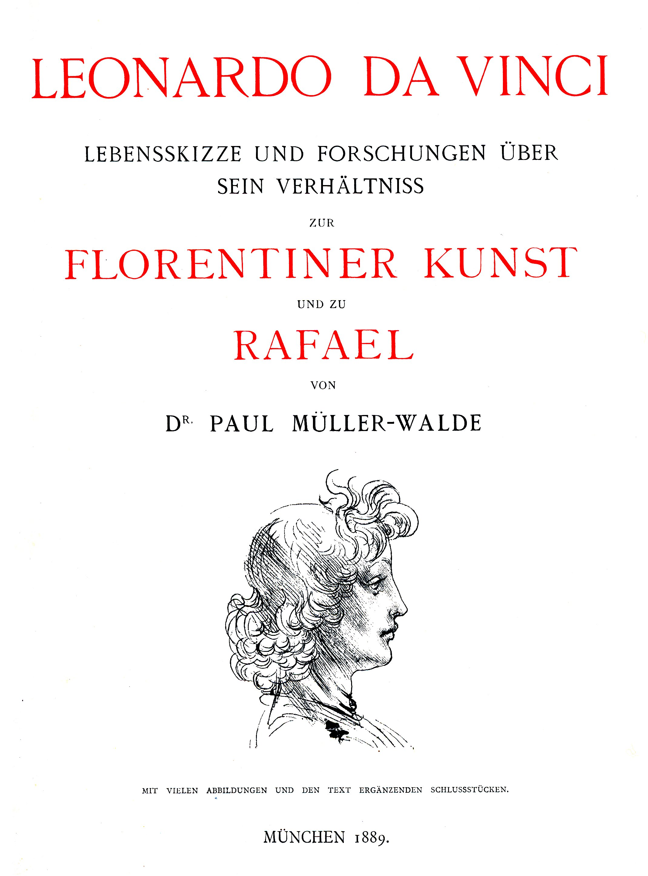 Titelseite des Buches „Leonardo da Vinci - Lebensskizze und Forschungen über sein Verhältniss zur Florentiner Kunst und zu Rafael“